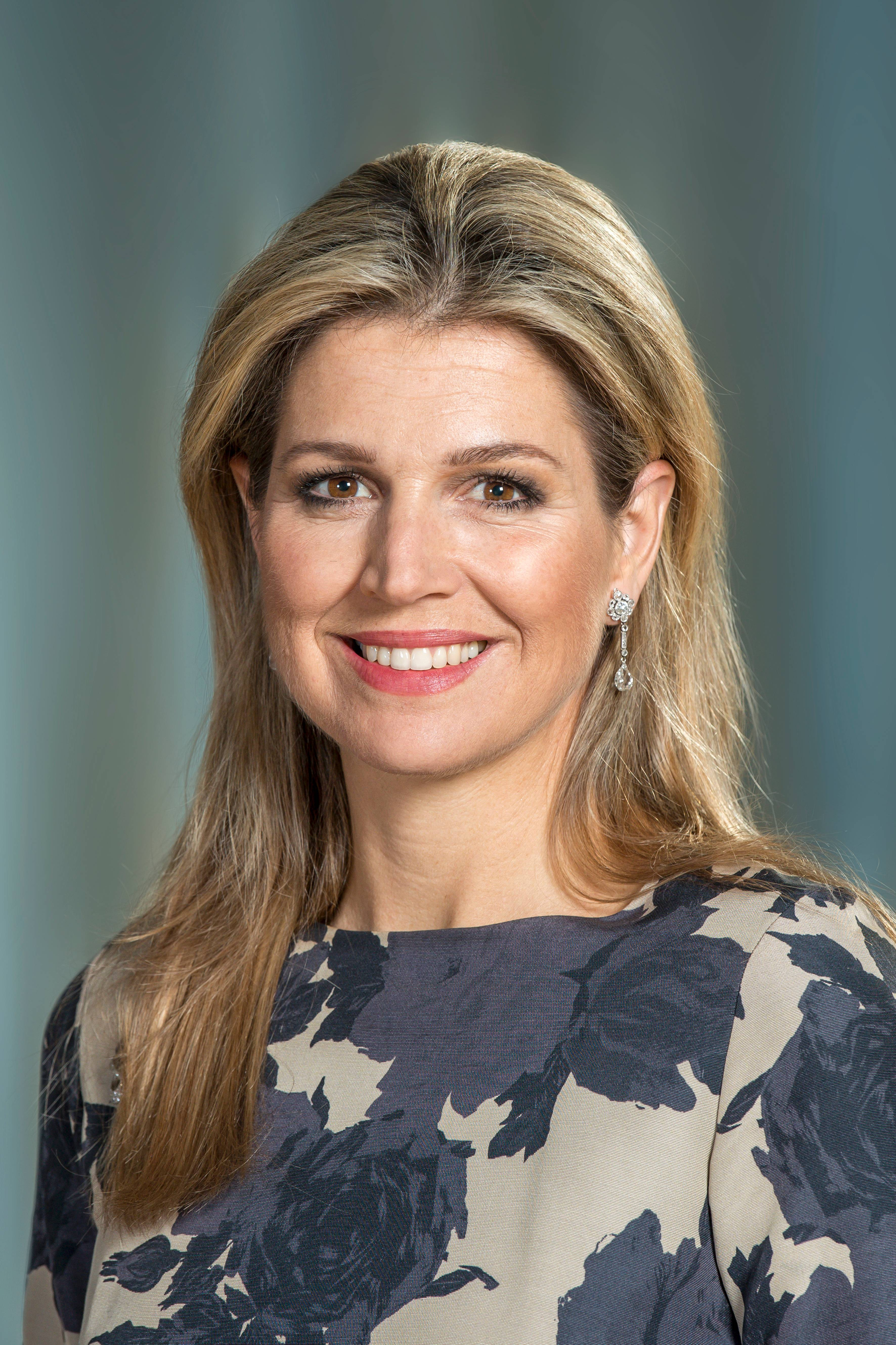 Koningin Maxima (2015)